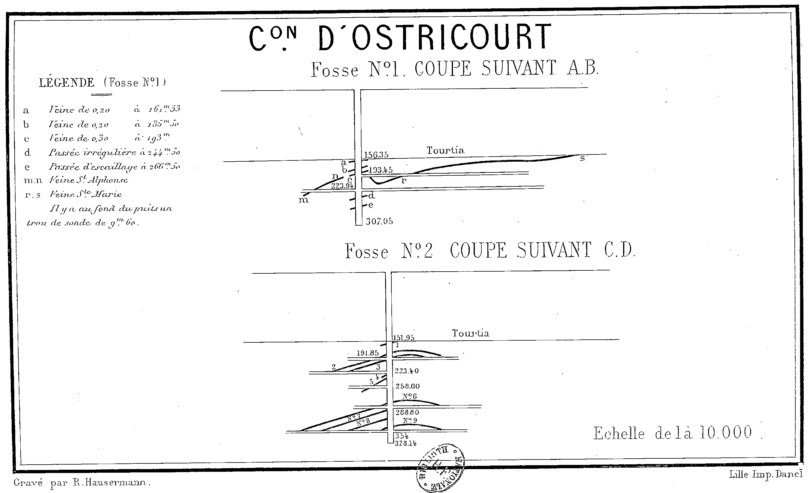 Coupes verticales des puits n° 1 et 2 de la Compagnie des mines d'Ostricourt vers 1880.